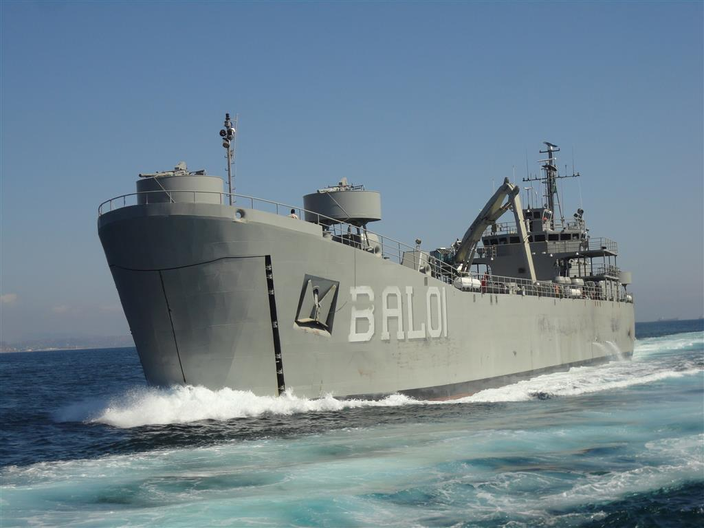 BAL-01 navegando